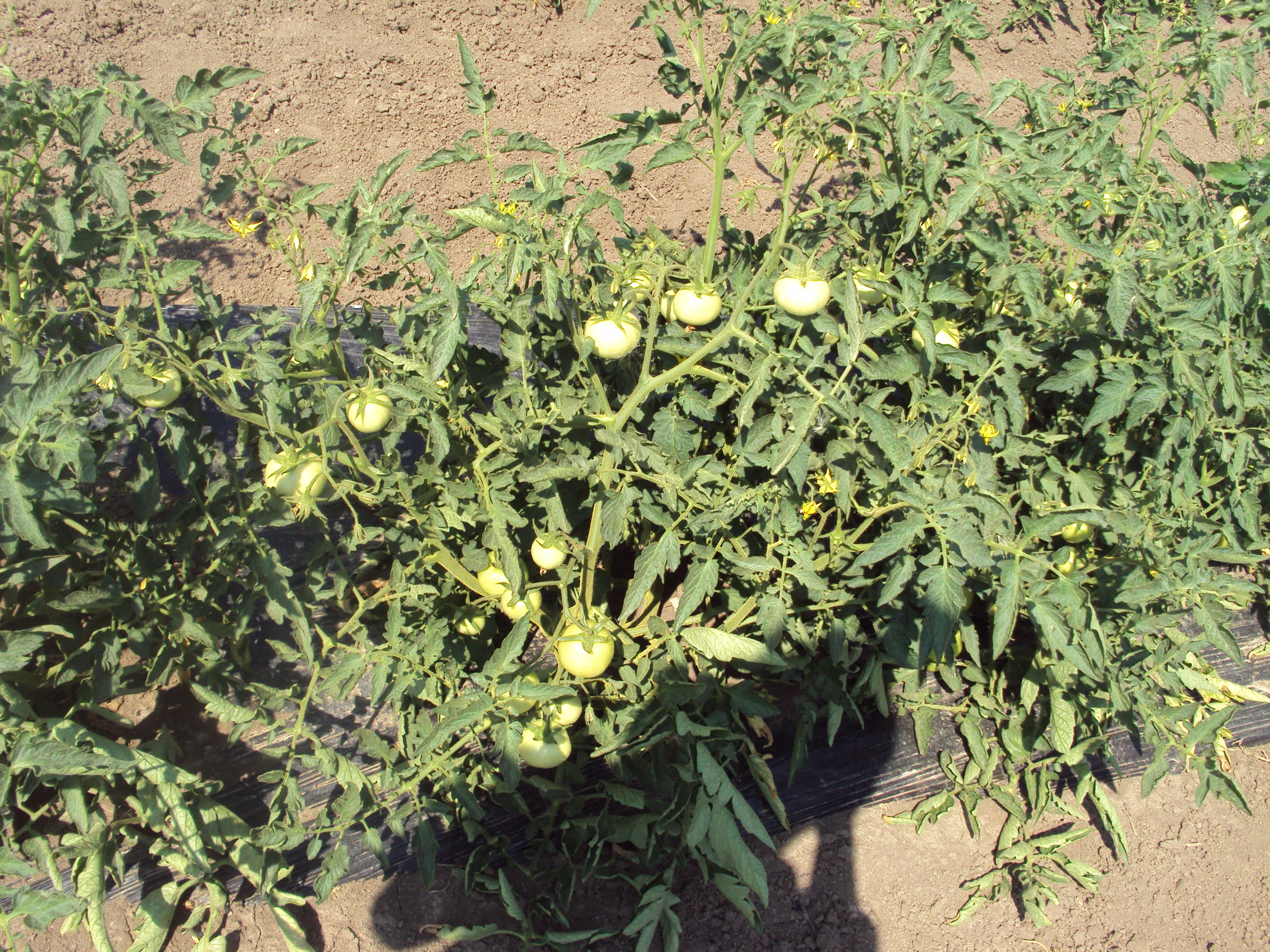 Поље